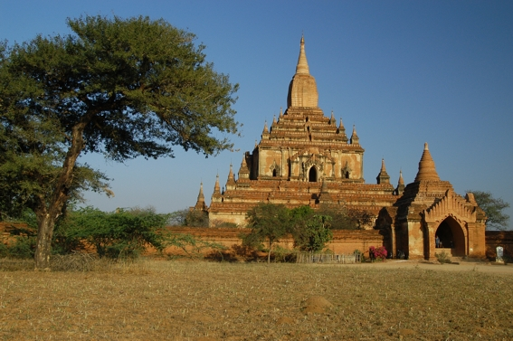 Der prächtige Sulamani-Tempel in Bagan